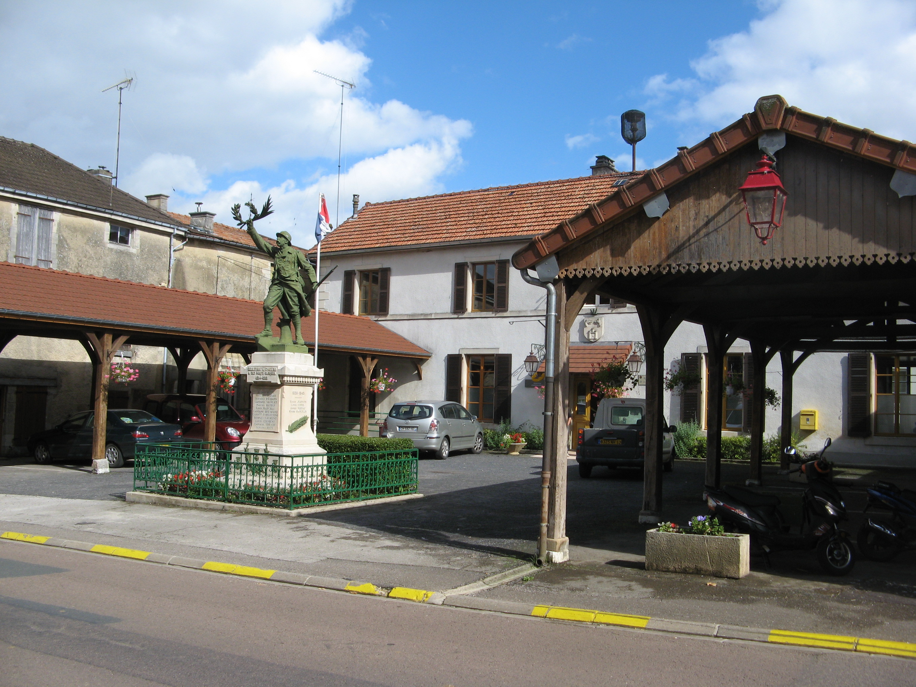 Doulevant-le-Château, mairie et monument aux morts.